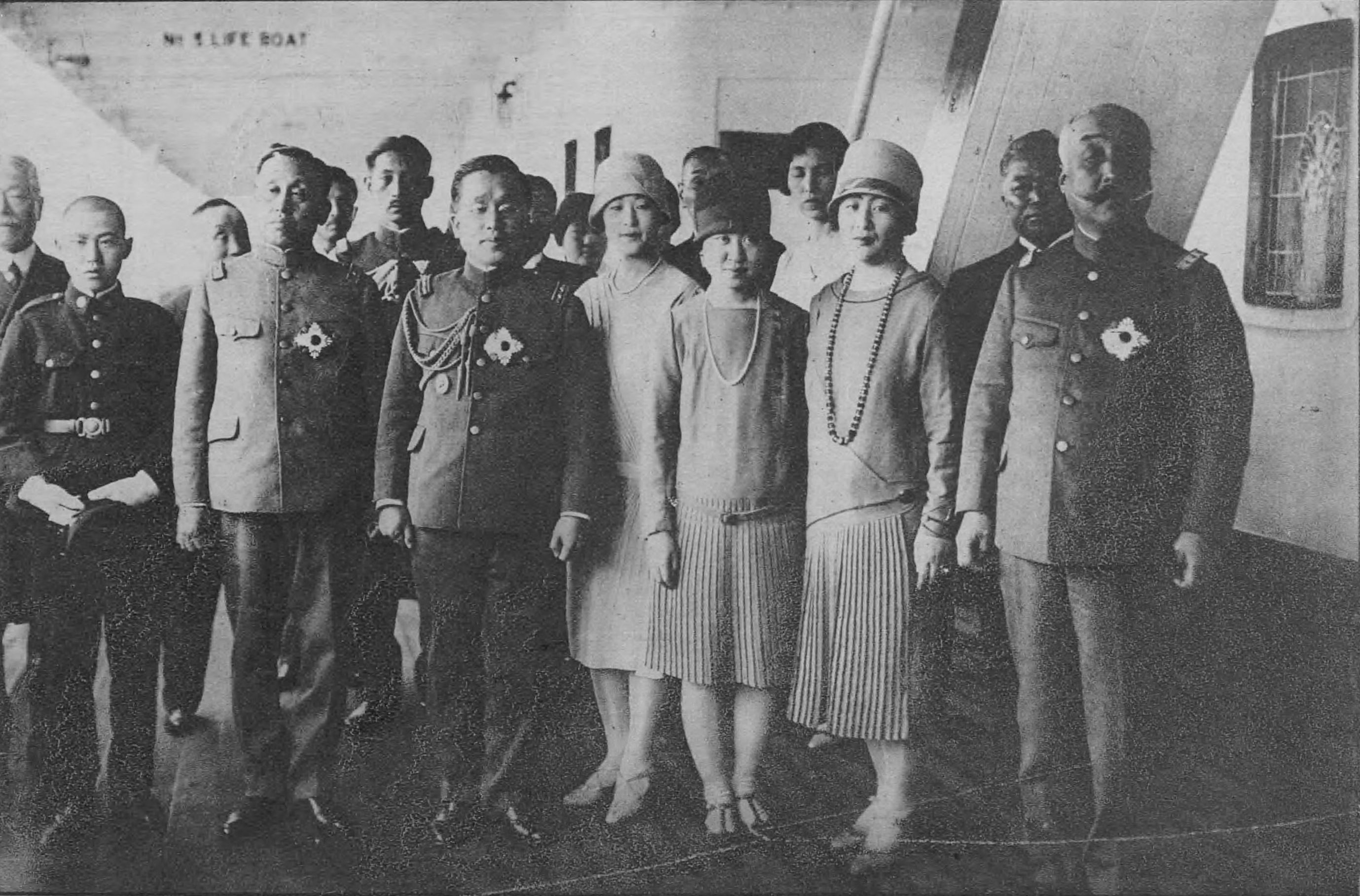 1928년 4월 9일 고베 항에서 이우, 이강, 이은, 이방자, 덕혜옹주, 이쓰코, 나시모토노미야 모리마사